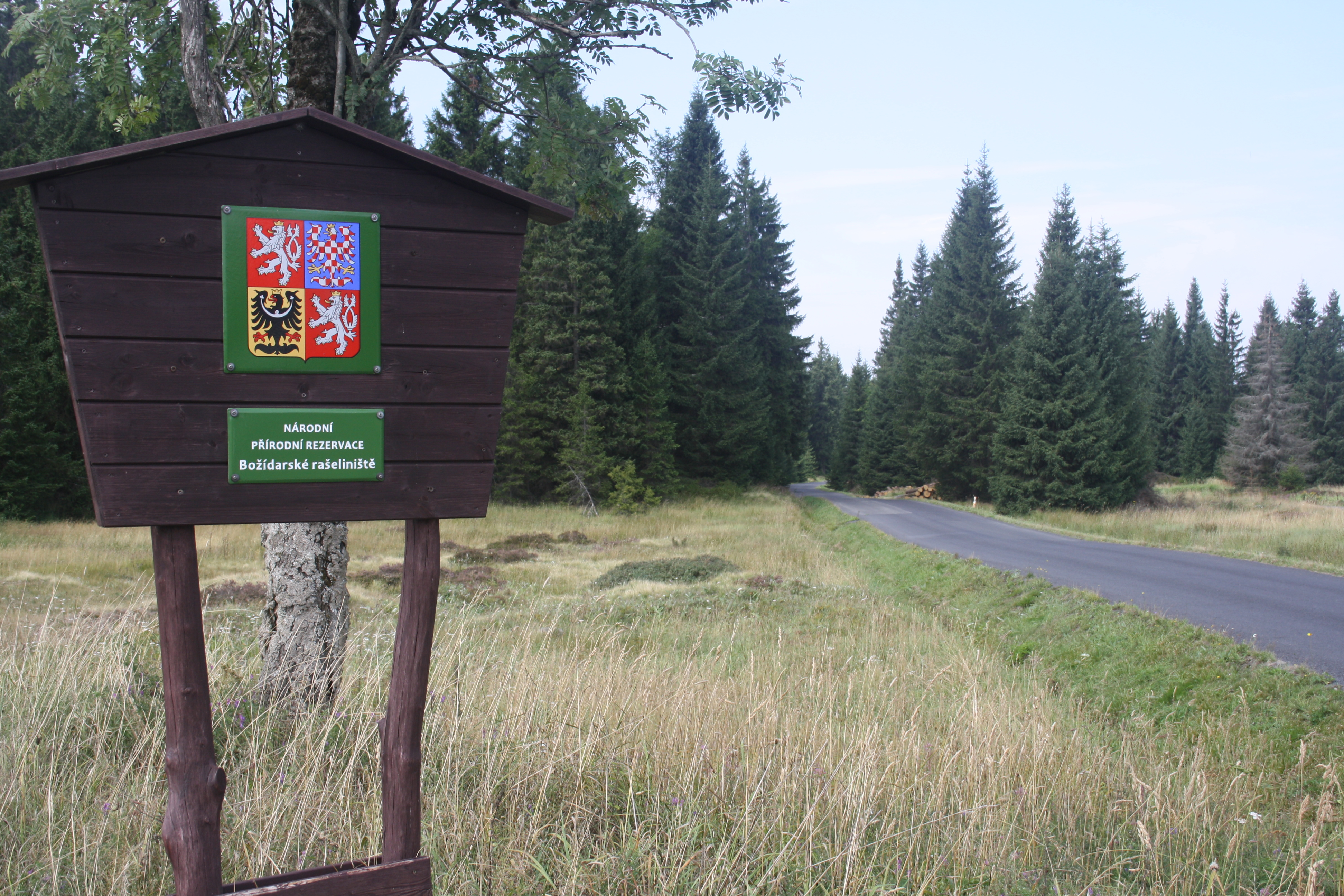 Toegang informatiepad